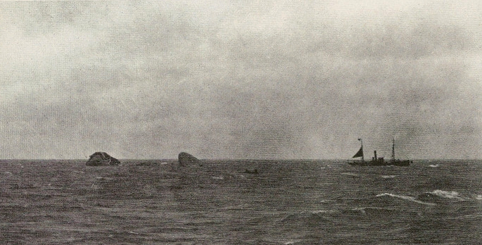 Rest vom L 1 vor dem Untergehen